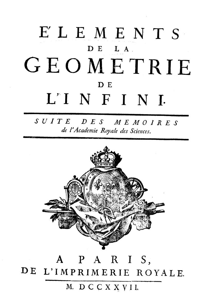 Élements de la geometrie de l'infini. Suite des memoires de l'Academie Royale des sciences. - Paris : de l'Imprimerie royale, 1727. - [28], 548 p., 1 c. di tav. ripiegata ; 4º. - Il nome dell'autore si desume dall'Extrait des registres de l'Academie Royale des Sciences a c. c3v .